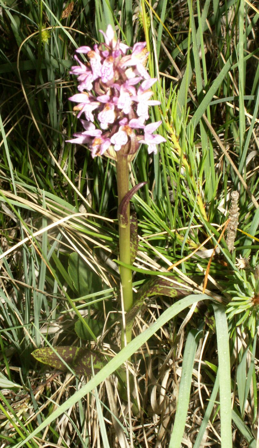 Dactylorhiza cruenta, Lithuania